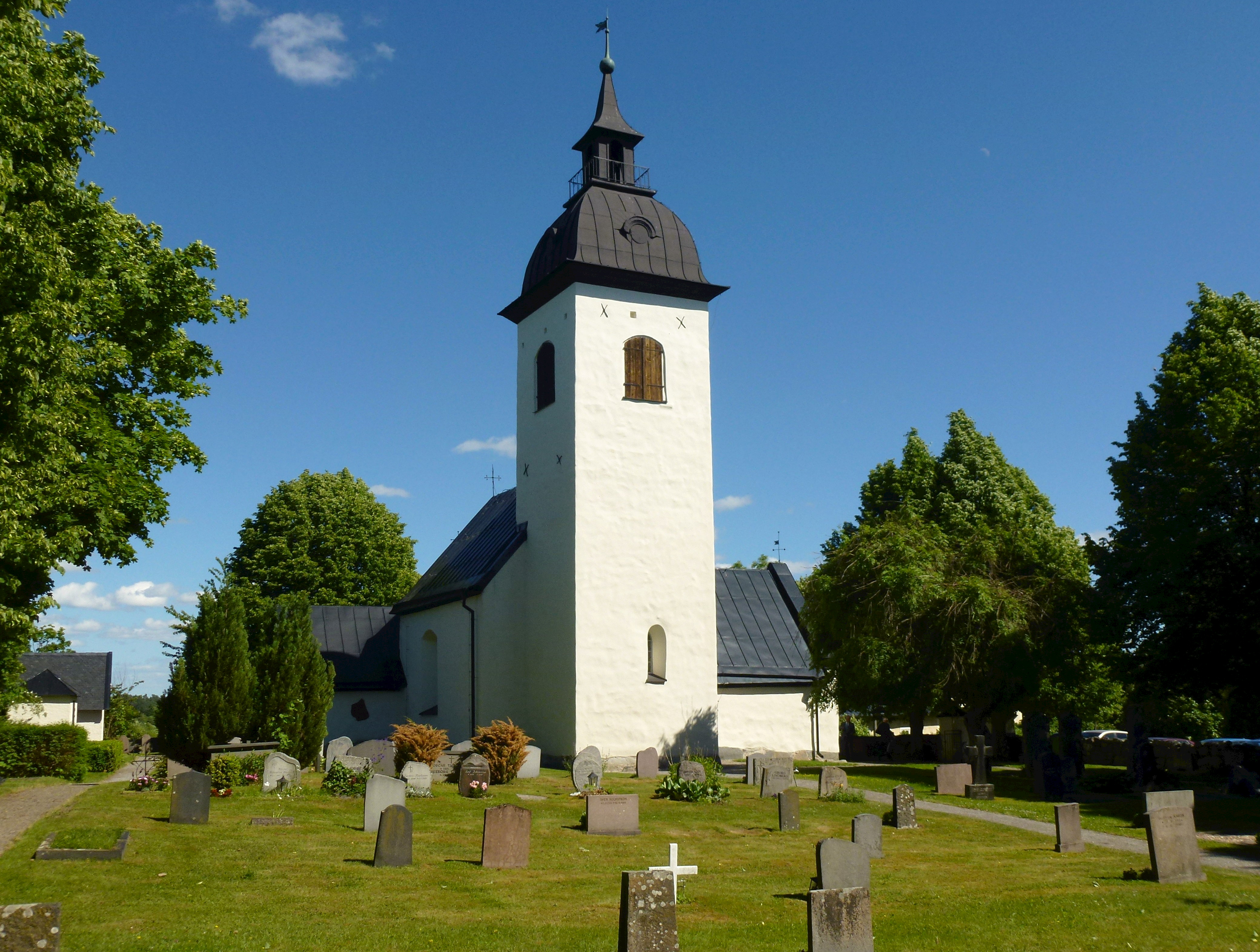 Hilleshögs kyrka och kyrkogård